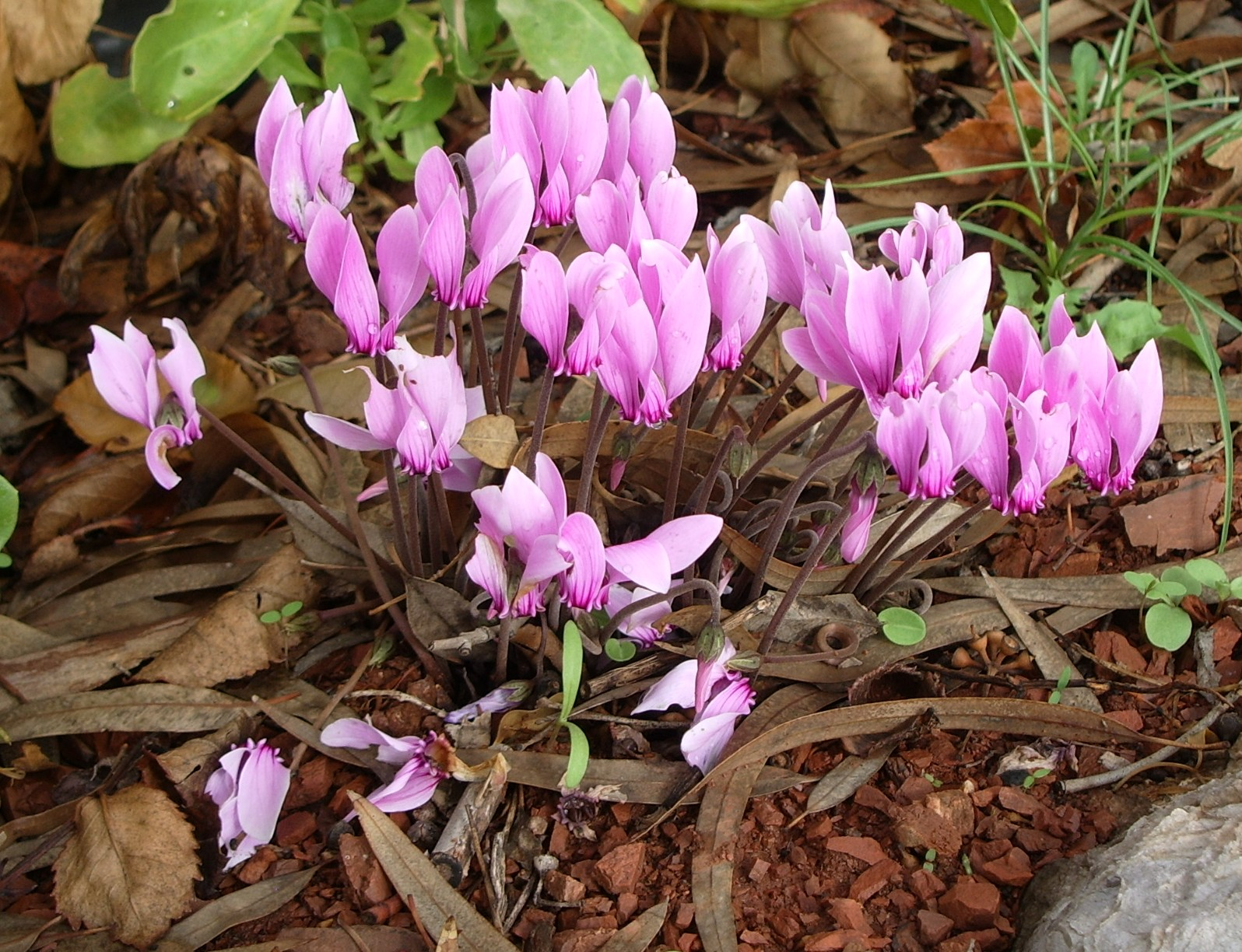 wild wachsendes Alpenveilchen in Messenien